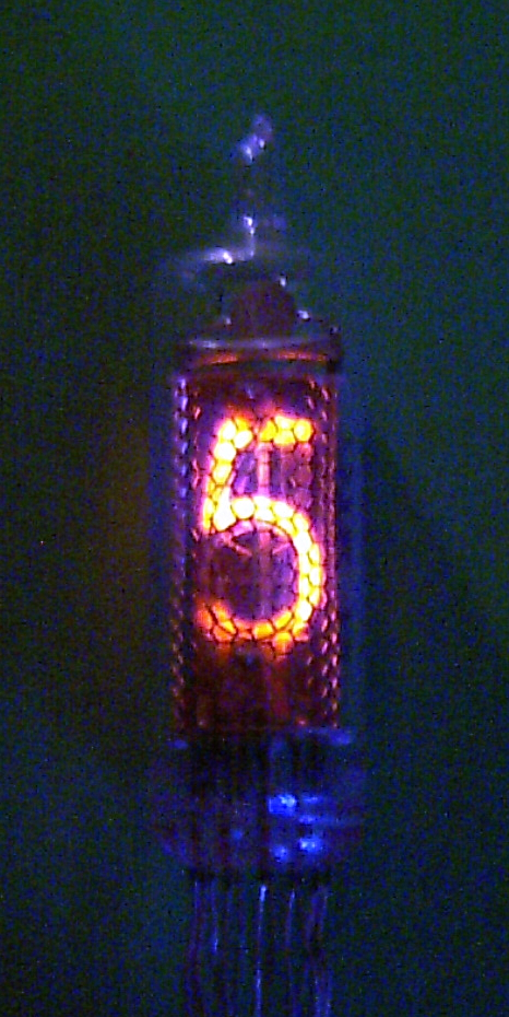 Tubo Nixie en funcionamiento